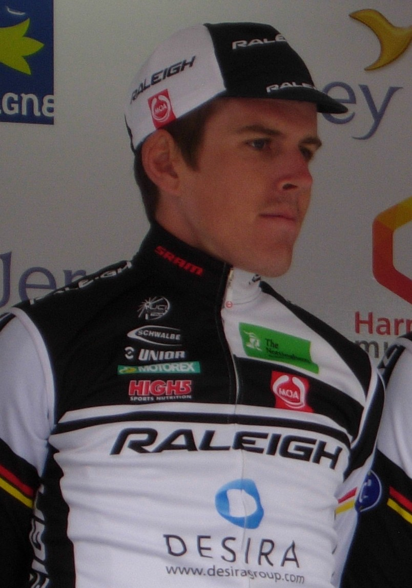 Tour de Bretagne 2013 - Présentation des équipes au départ de la deuxième étape à Ploemel - Équipe Raleigh Depicted person: Mark O'Brien